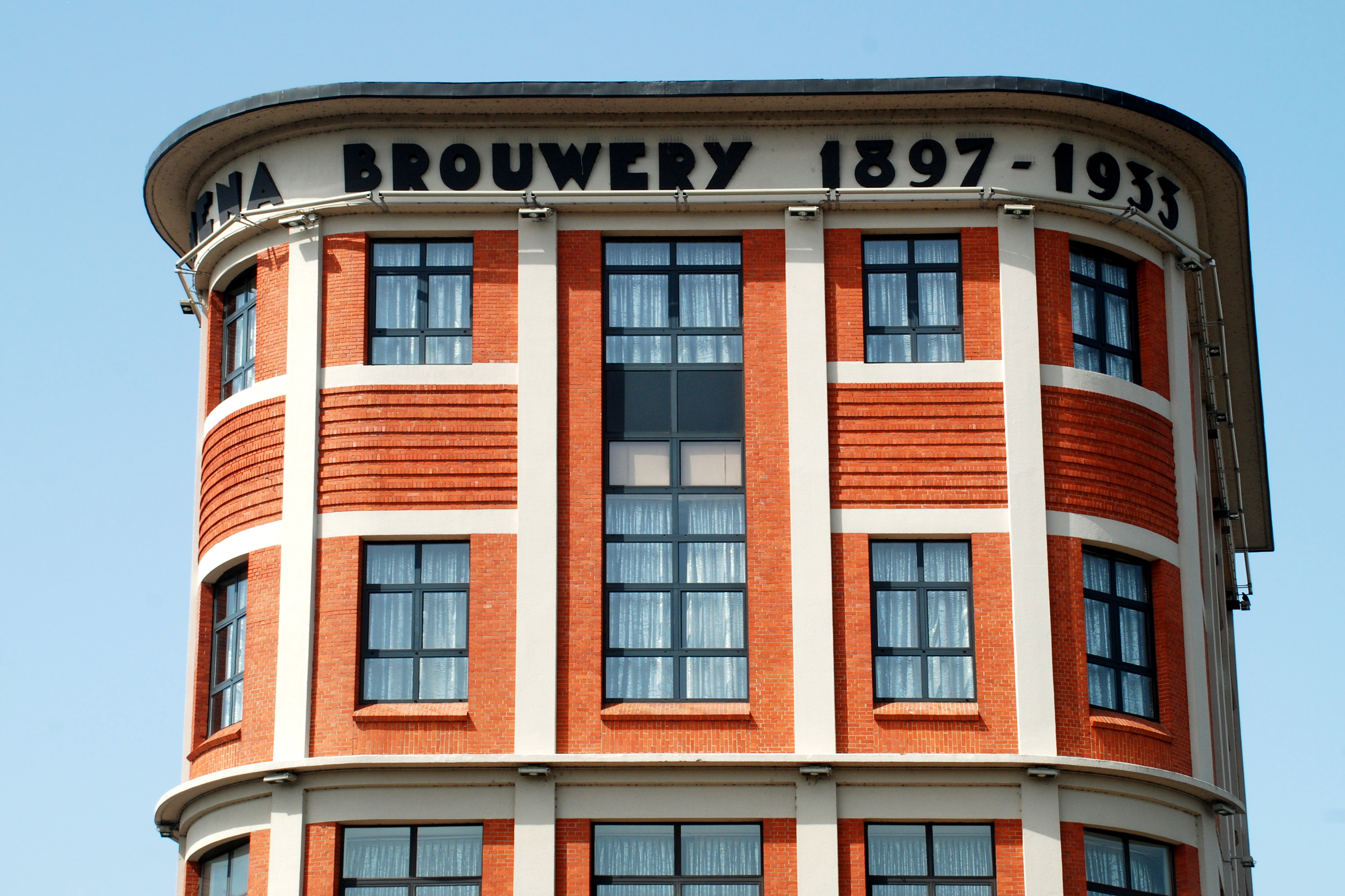 Belgie - Vlaams Brabant - Rotselaar - Voormalige brouwerij Mena